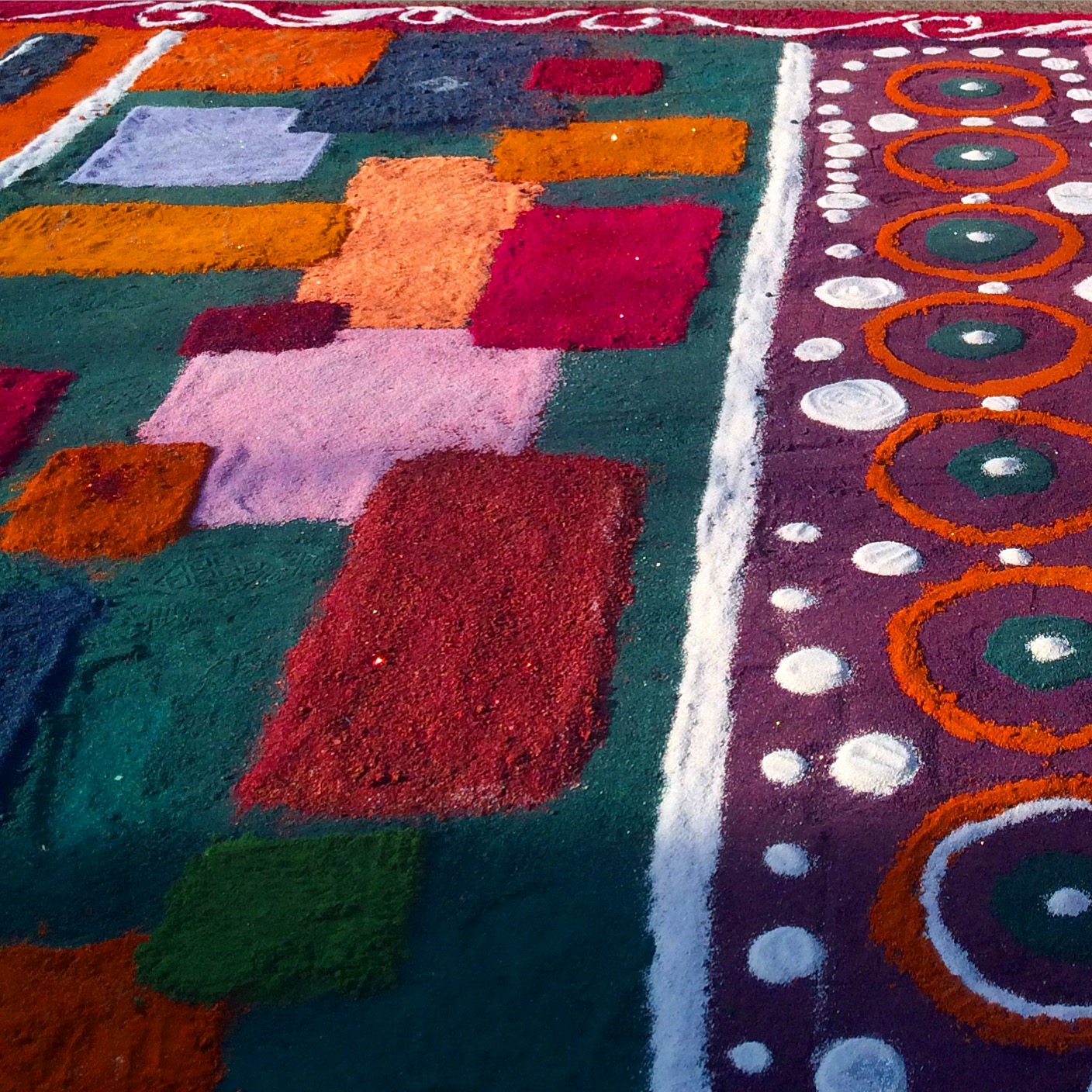 Tapetes de Aserrín elaborados previo al Paseo de San Miguel Arcángel en Uriangato durante la Octava Noche del 6 de Octubre.